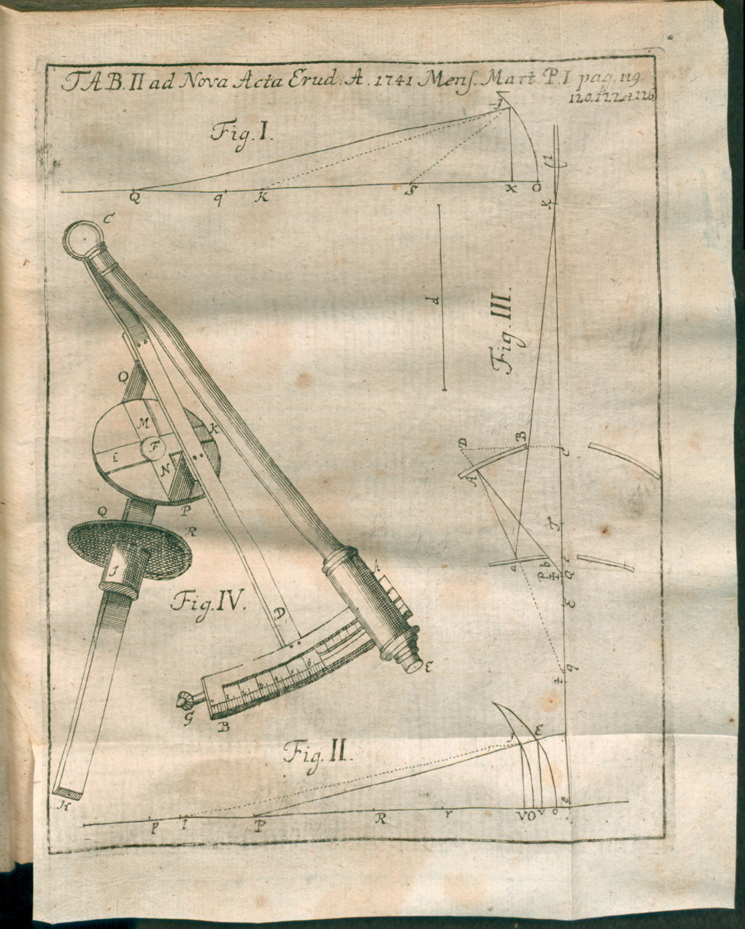 Illustration